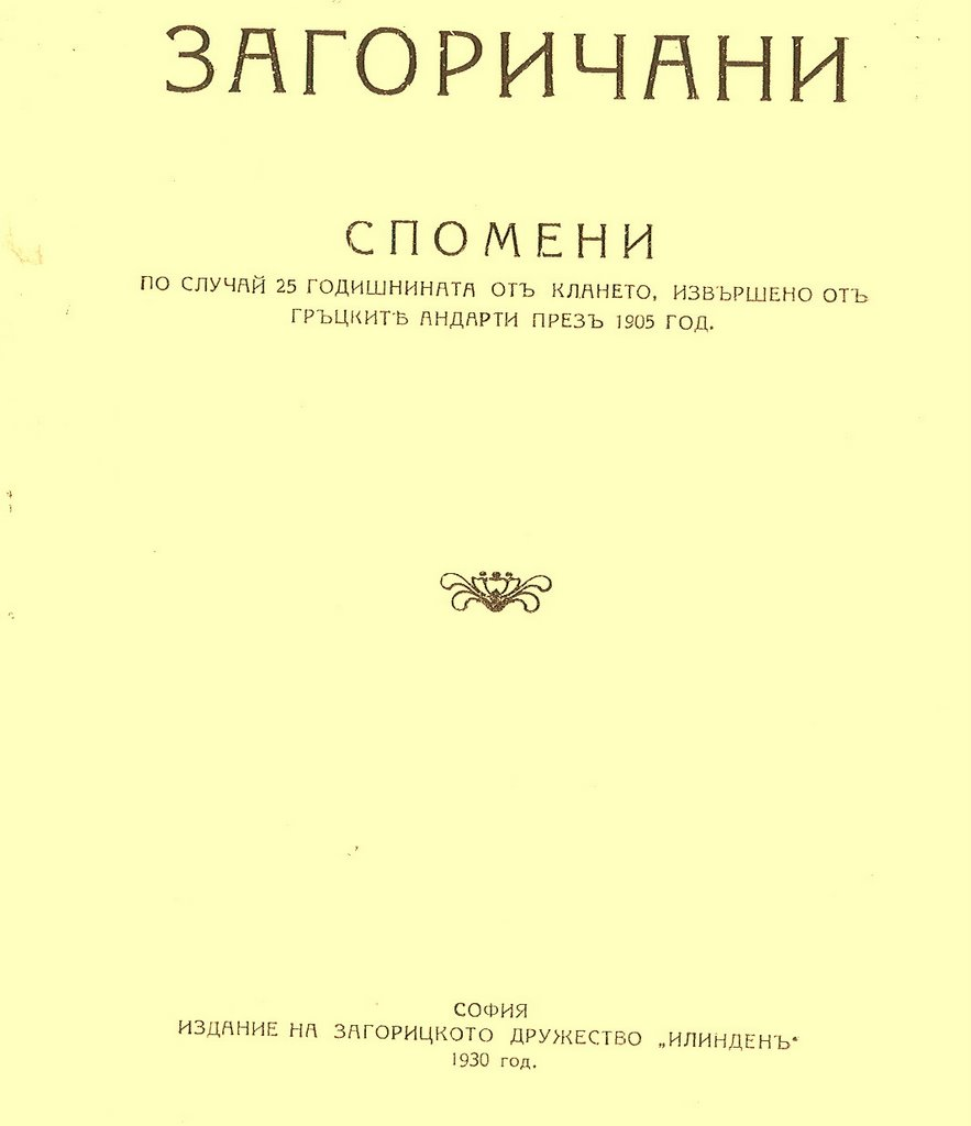 "Загоричани. Спомени"